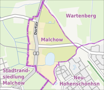 Übersichtskarte der Straßen und Ortslagen in Berlin-Malchow